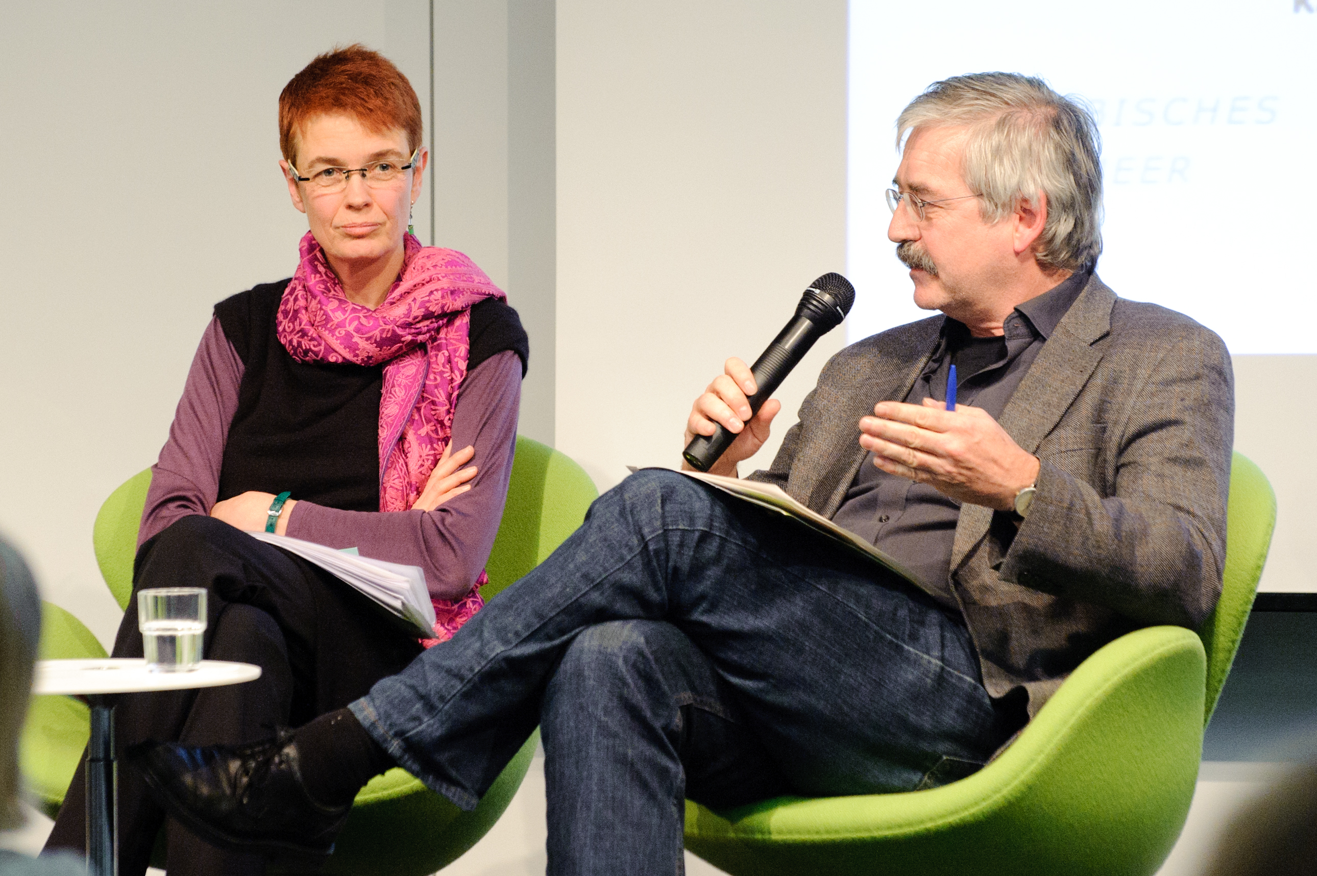 Ute Koczy, Thomas Gebauer, Geschäftsführer medico international Bild: Stephan Röhl